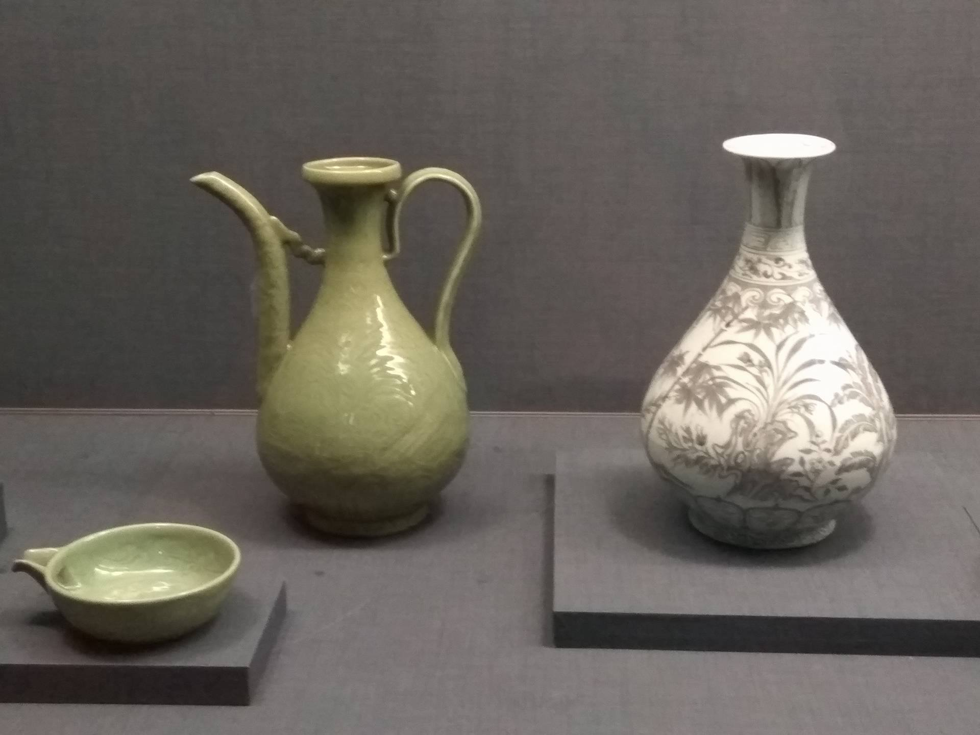 左邊為劃花芭蕉湖石執壺，右邊為釉裡紅竹石圖玉壺春瓶